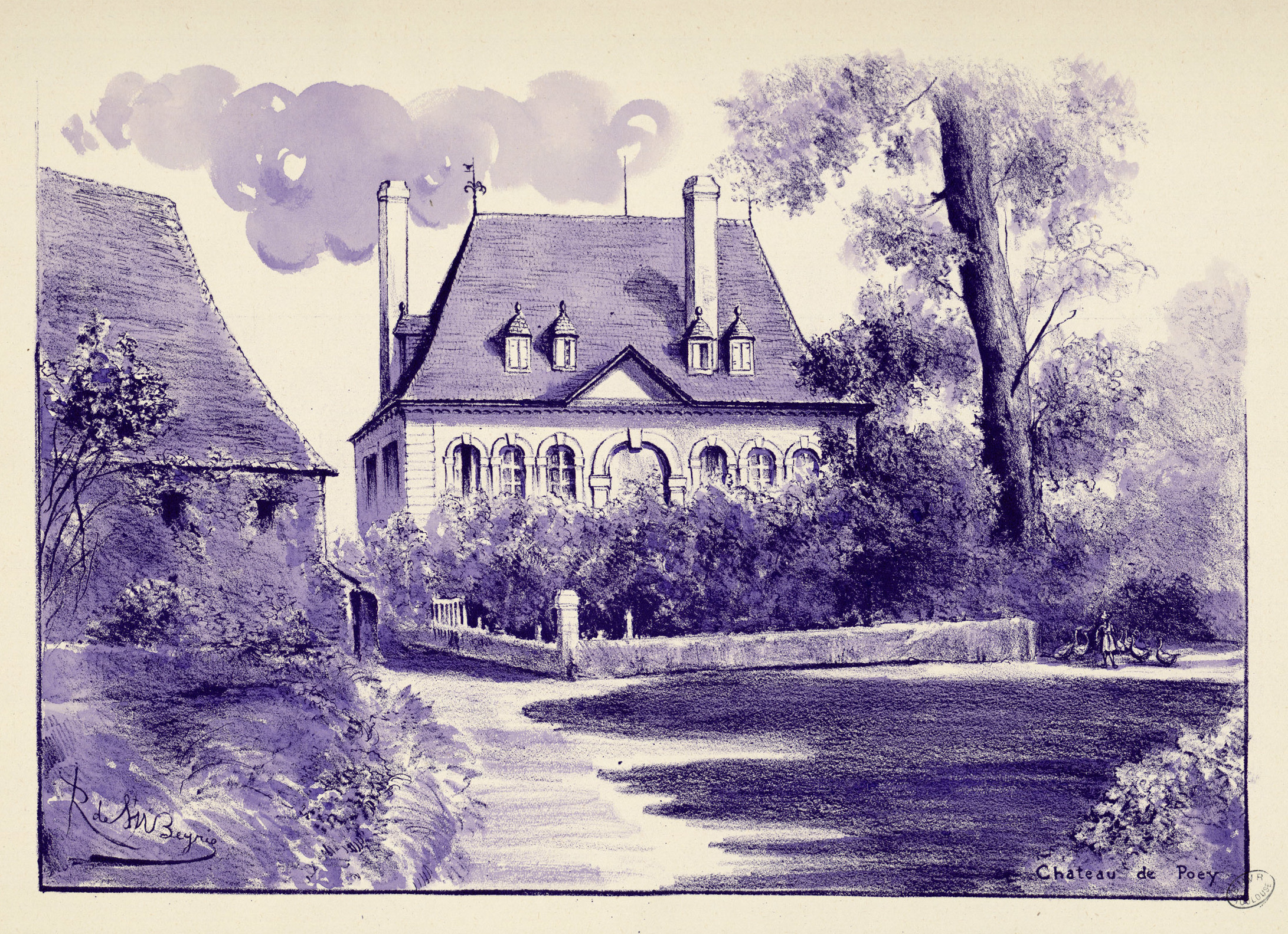 Ancely, René (1876 - 1966). Possesseur